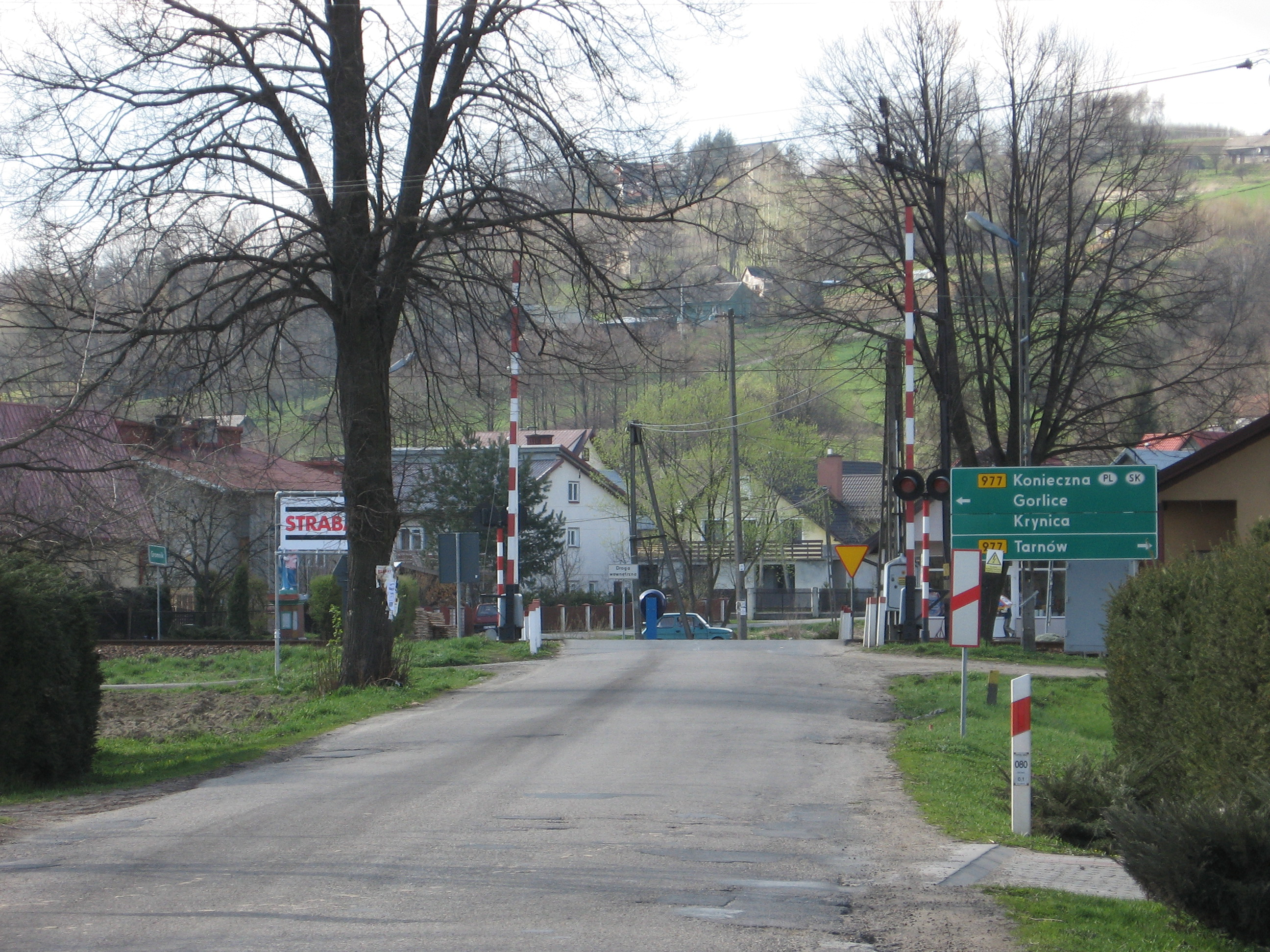 Droga wojewódzka nr 980 w Gromniku(ul.K.Jagiellończyka)